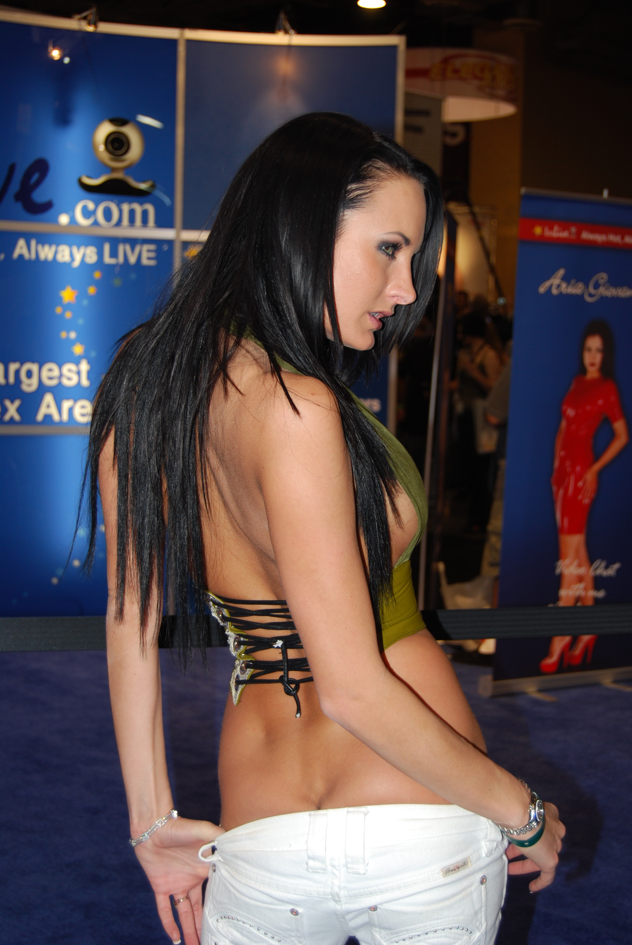 AEE2008_Nikon_Day2 426